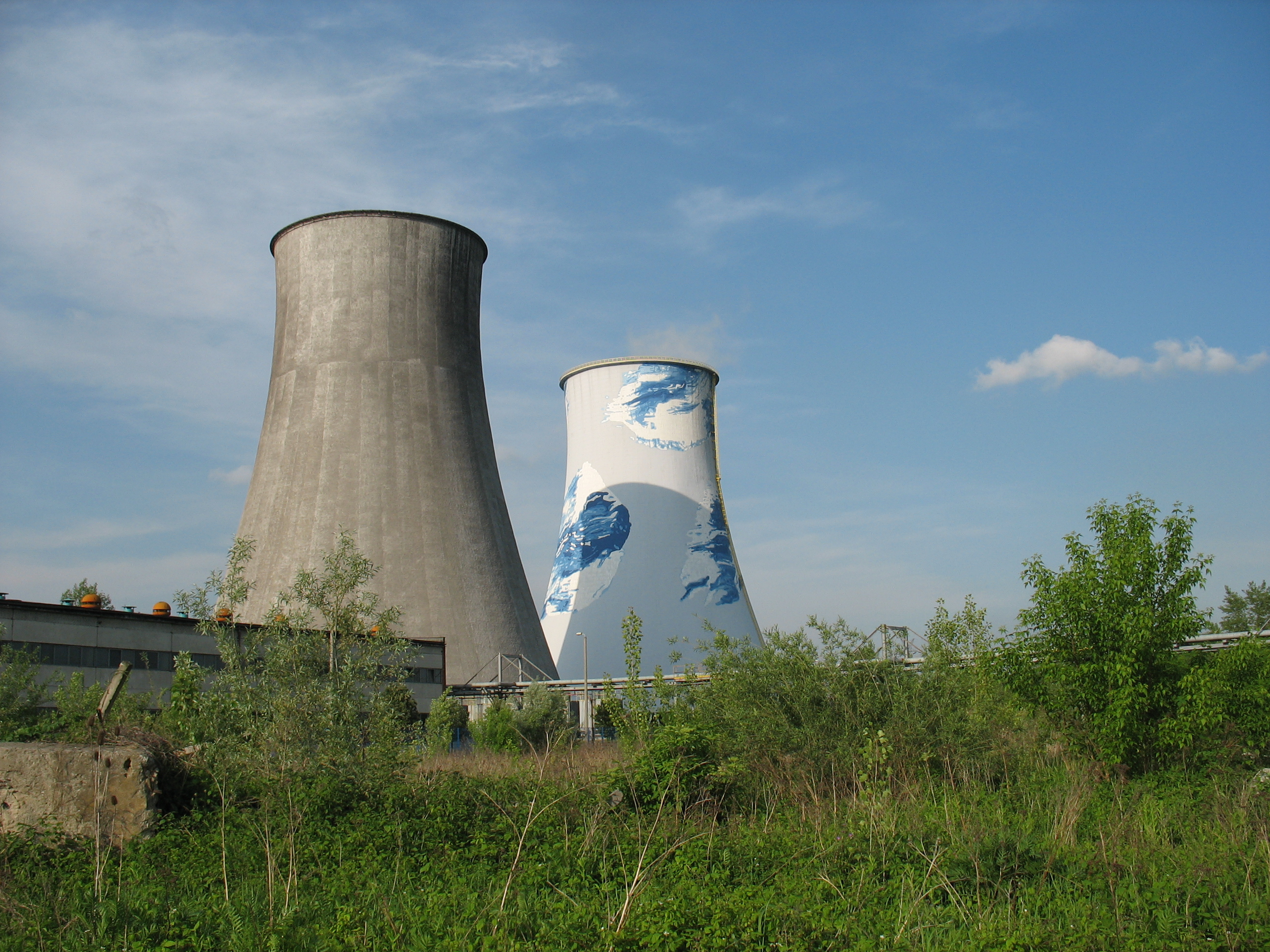 Komíny teleplné elektrárny Krakov